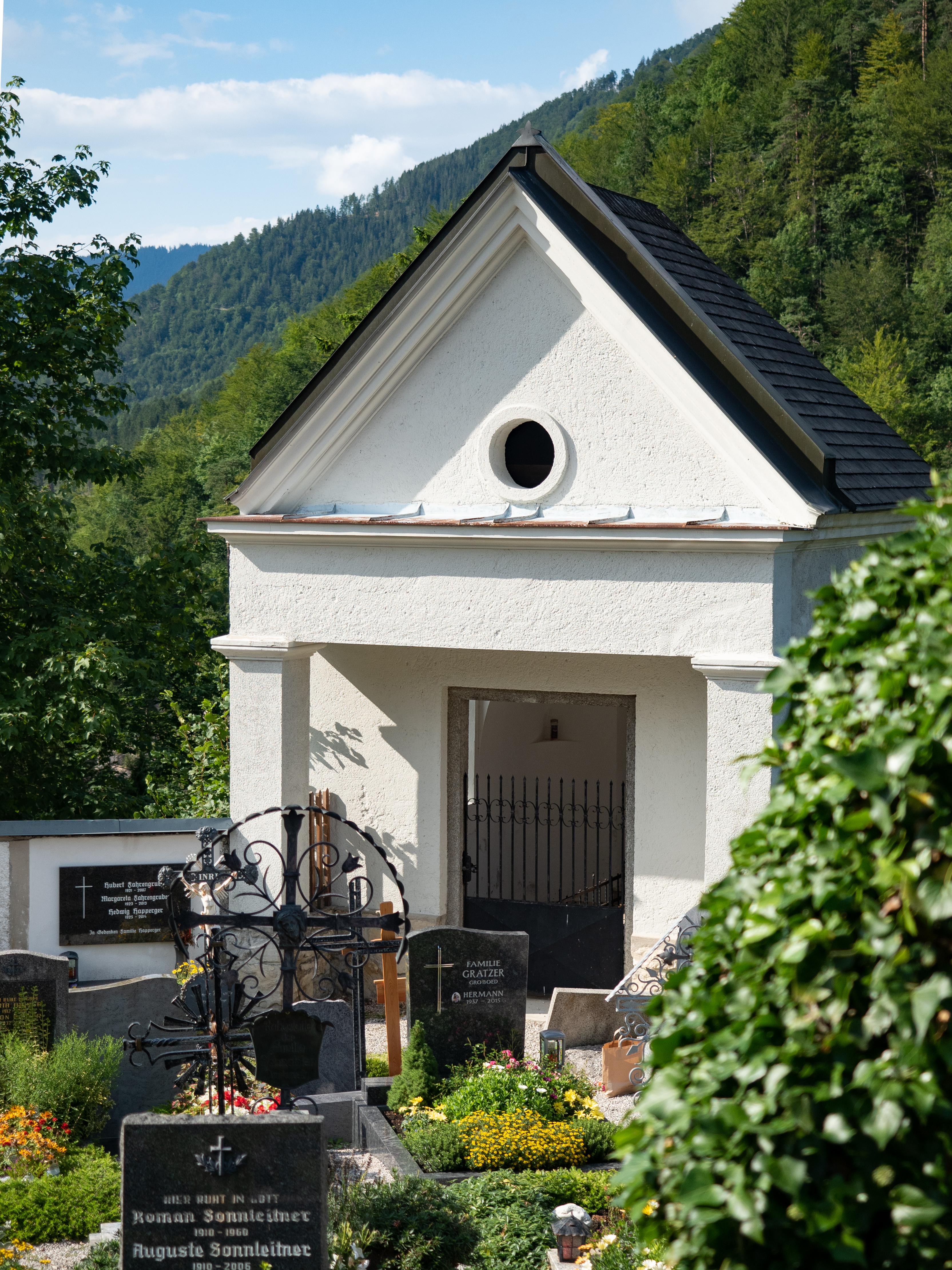 Gruft am Friedhof von Hollenstein an der Ybbs, in ihr liegt unter anderen Bohuslav Kokoschka begraben